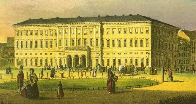 Neues Postgebäude (Hauptpost Leipzig) von Albert Geutebrück um 1840; Bild wahrscheinlich aus dem Bestand des Stadtgeschichtlichen Museums Leipzig